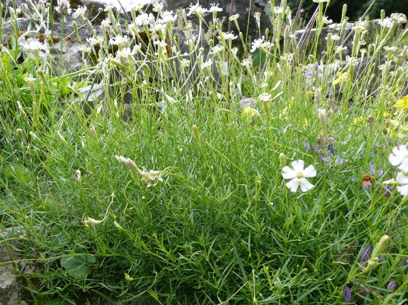 Silene saxifraga, Botanischer Garten Erlangen, 2008